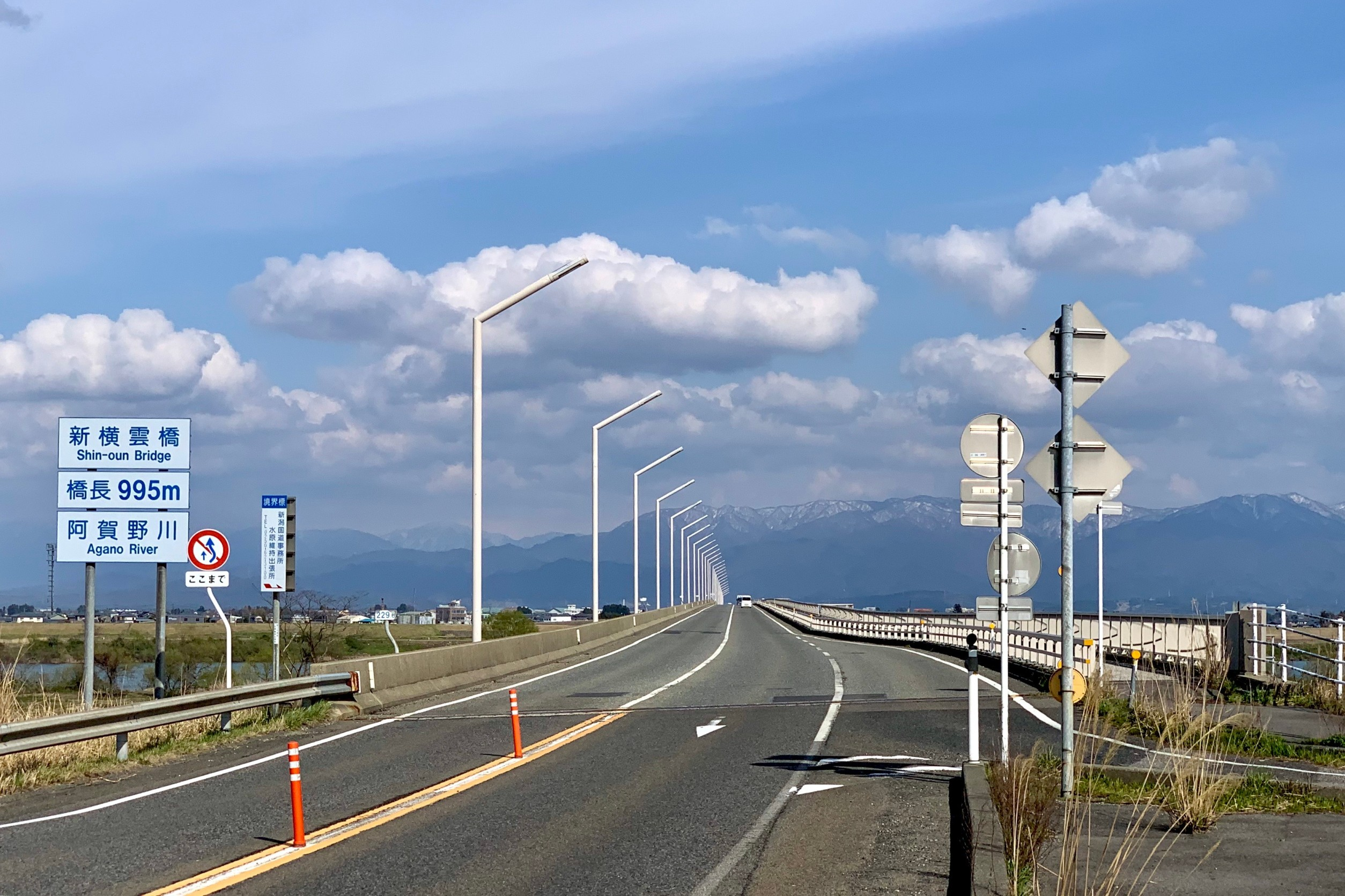 国道49号横雲バイパス 新横雲橋 左岸側（2020年4月）